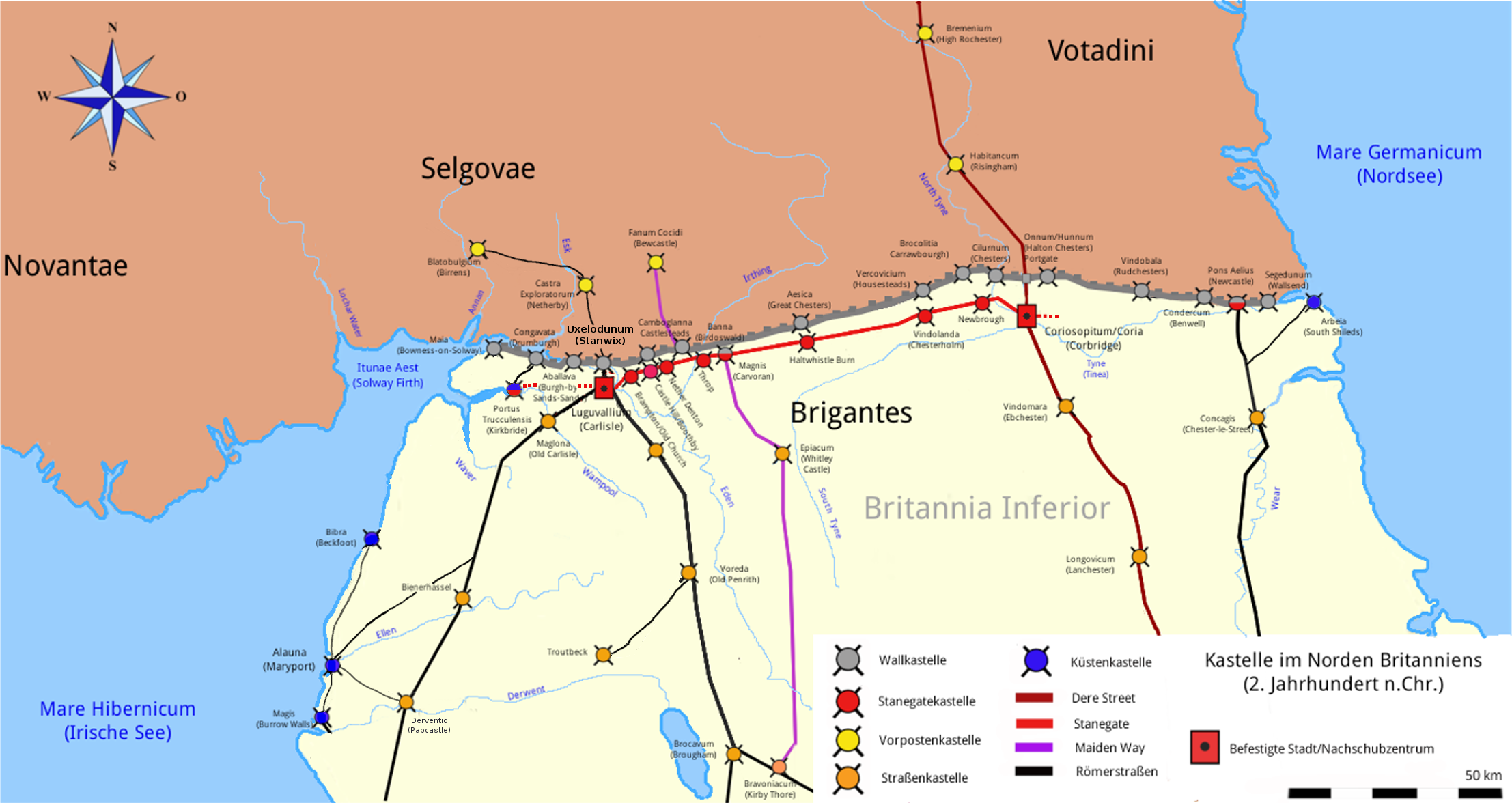 Lageskizze der Kastelle am Stanegate und Hadrianswall, inkl. Küstenschutz Cumbria und Vorposten in Caledonia, 2. Jahrhundert n. Chr.